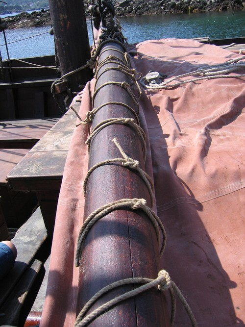 bilete av rå på vikingskipkopi